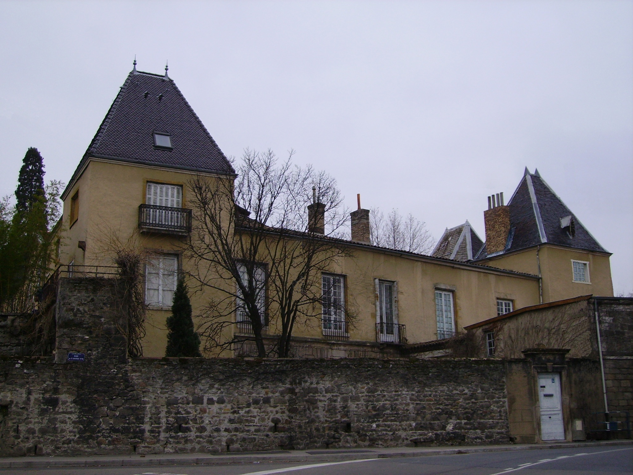 Château de la Tour ST Genis Laval (France) Photo AV Monteux 25/02/2006